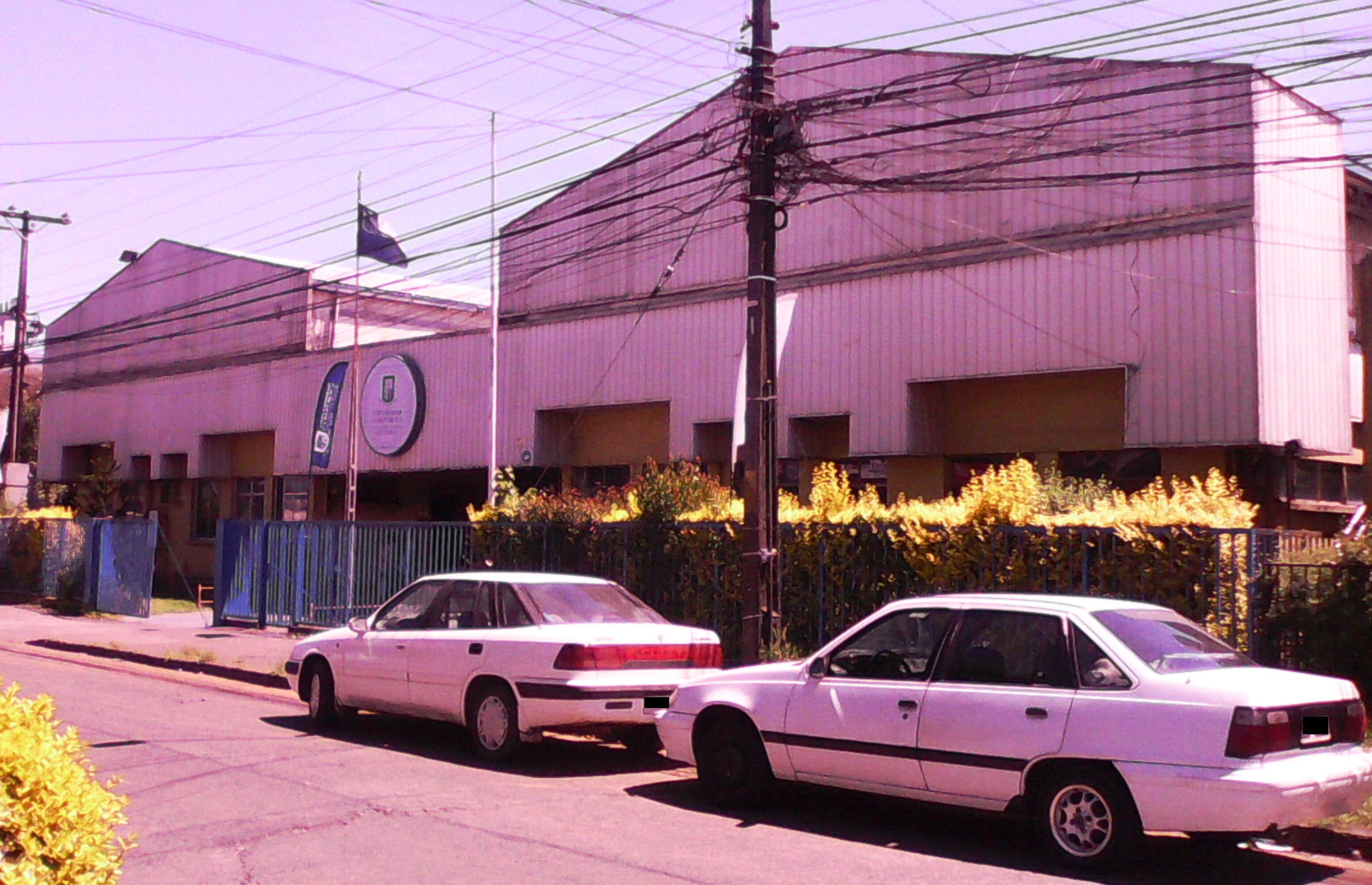 Sede de Temuco de la universidad chilena La República.